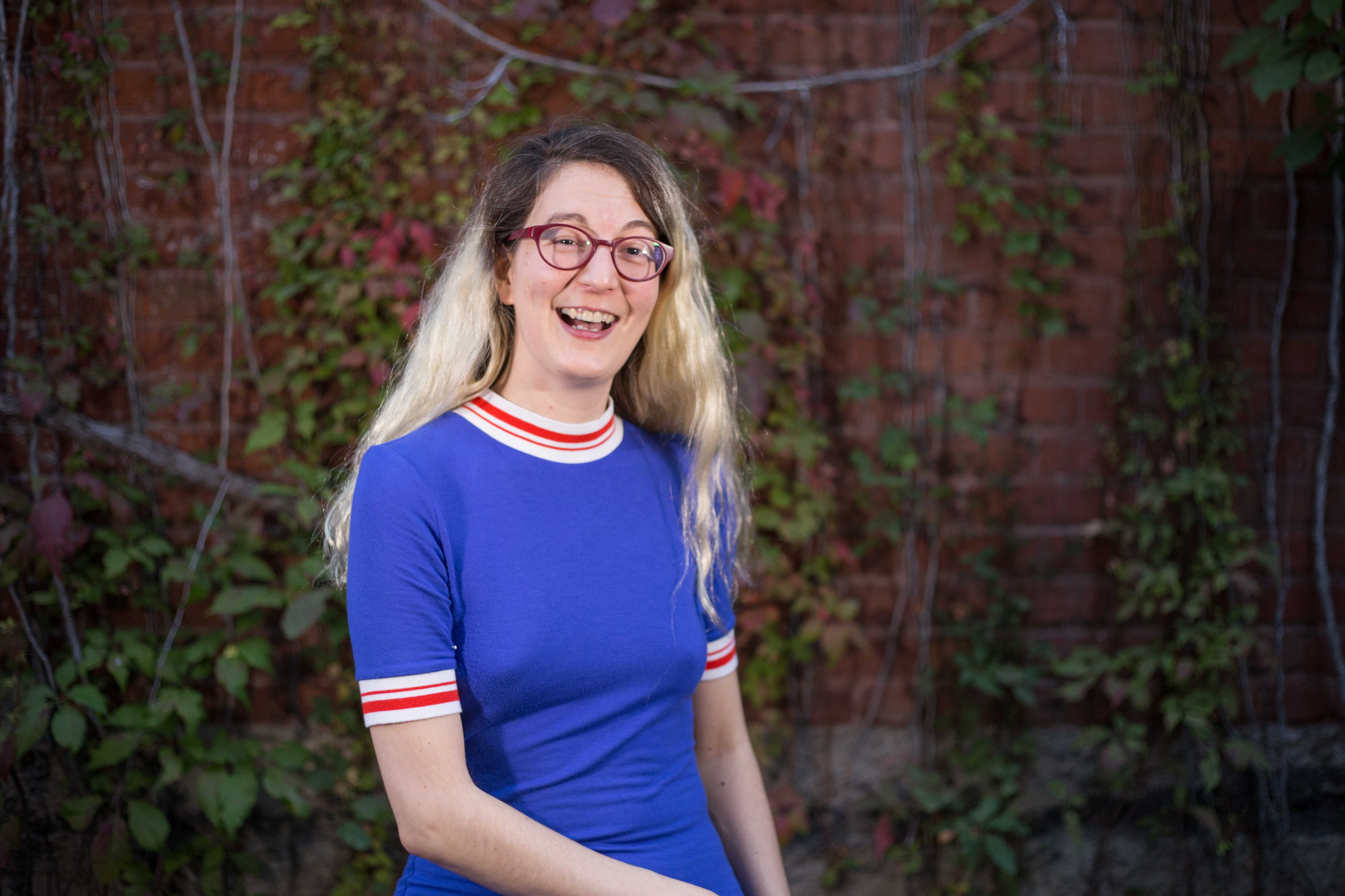 Portrait réalisé dans le cadre du 5 à 7 des Sommets du cinéma d’animation.